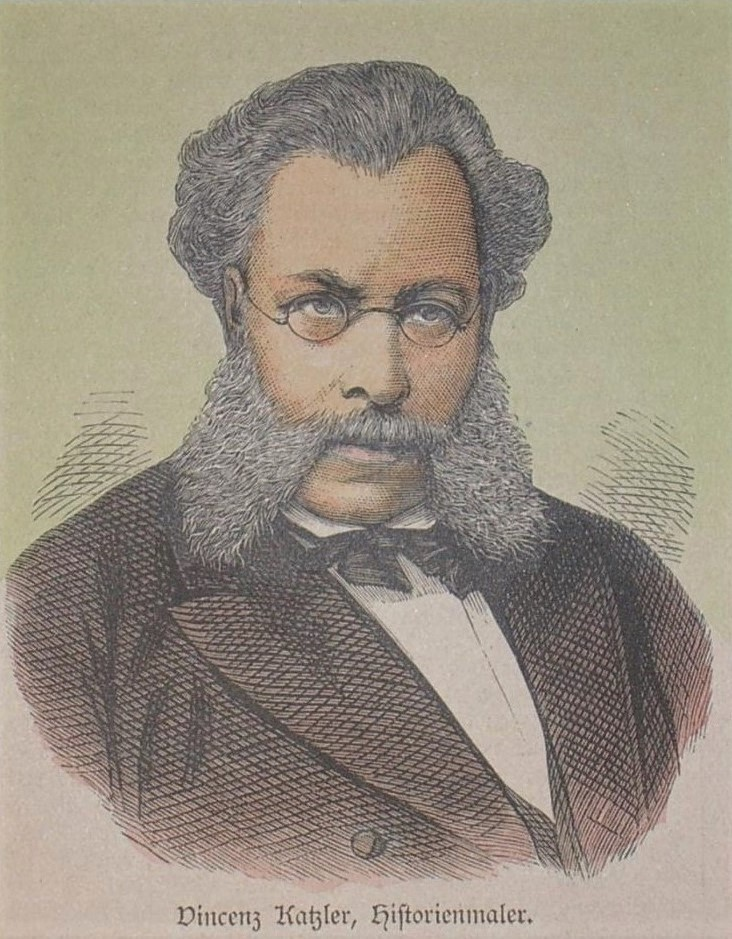 Der Historienmaler Vinzenz Katzler, 1882, teilkolorierter Holzstich, ca. 10 x 8,5 cm